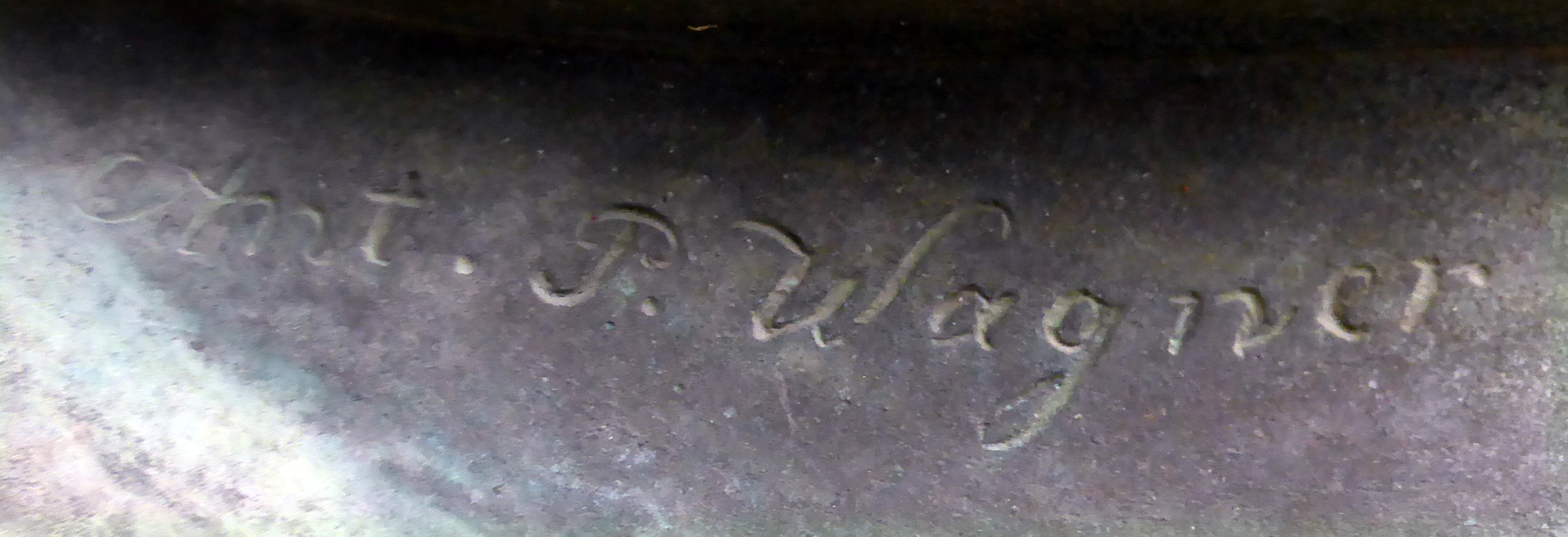 Anton Hansch Grabmal mit Bronzerelief vom Bildhauer Antonín Pavel Wagner (von 1877) auf dem Petersfriedhof Salzburg.